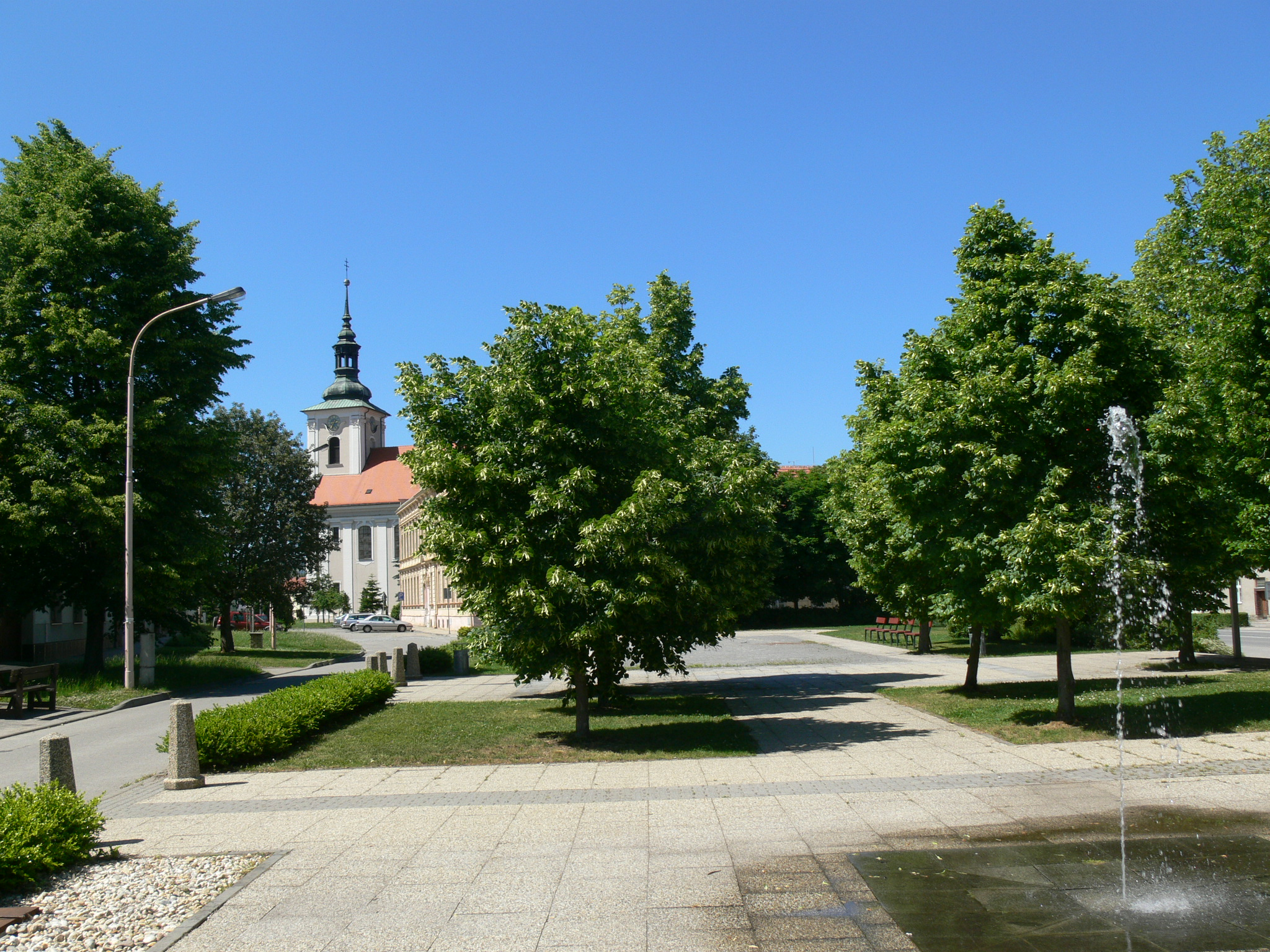 Dědice, náměstí Svobody, vodotrysk